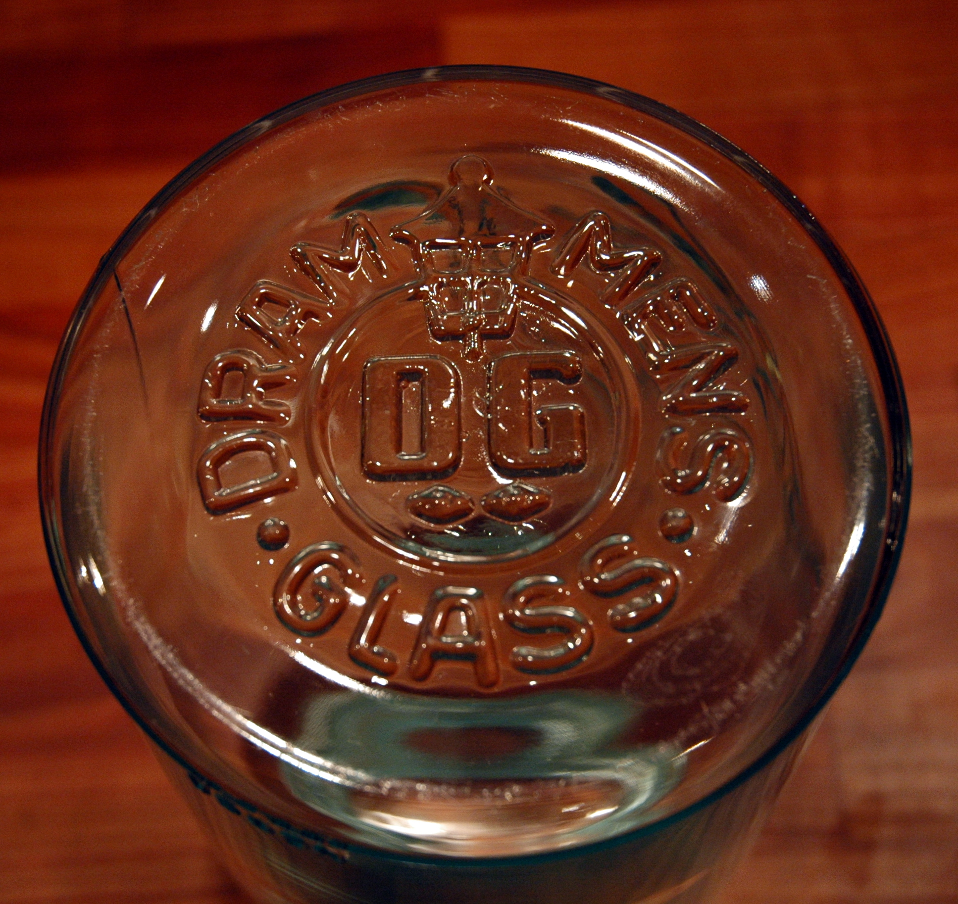 Produsentmerke frå undersida av eit glas for hermetisering, noregsglas, type "Norgesglass" Fotografert av Kjetil Lenes